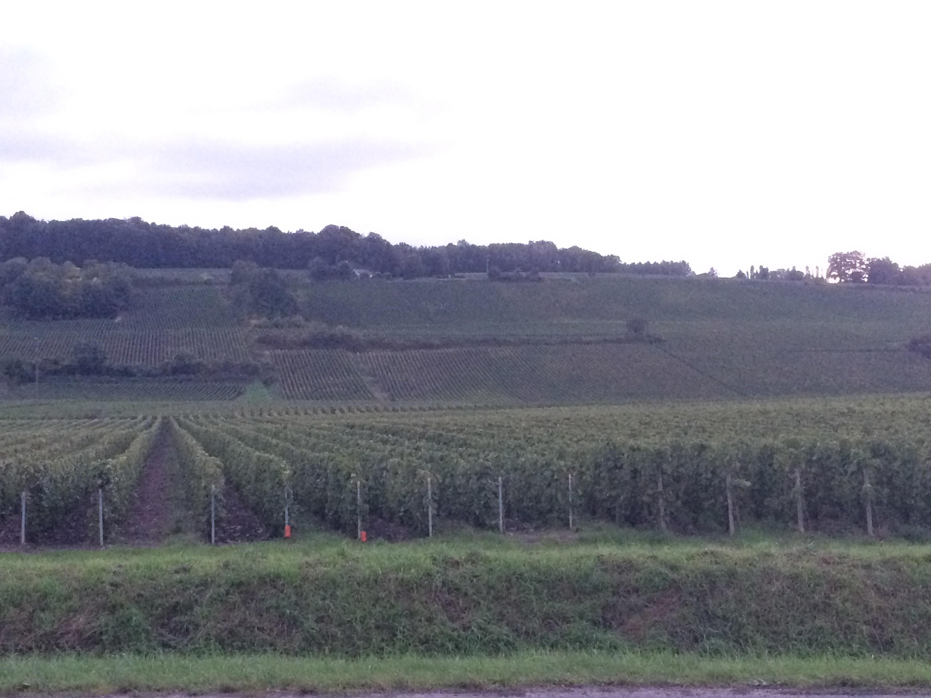 Les vignobles du Champagne à perte de vue... De quoi donner l'eau à la bouche 😉